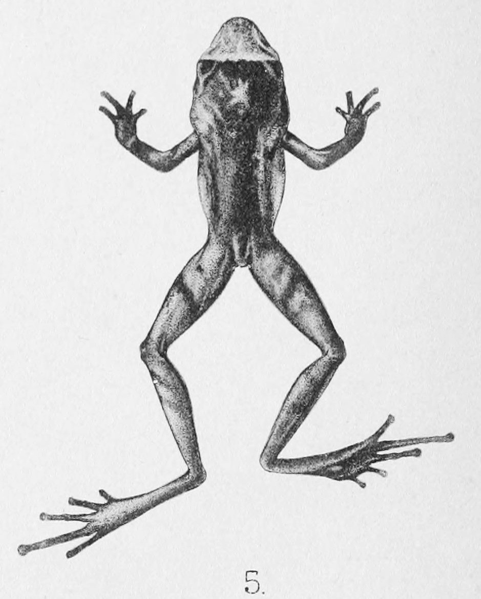 Philautus kempii